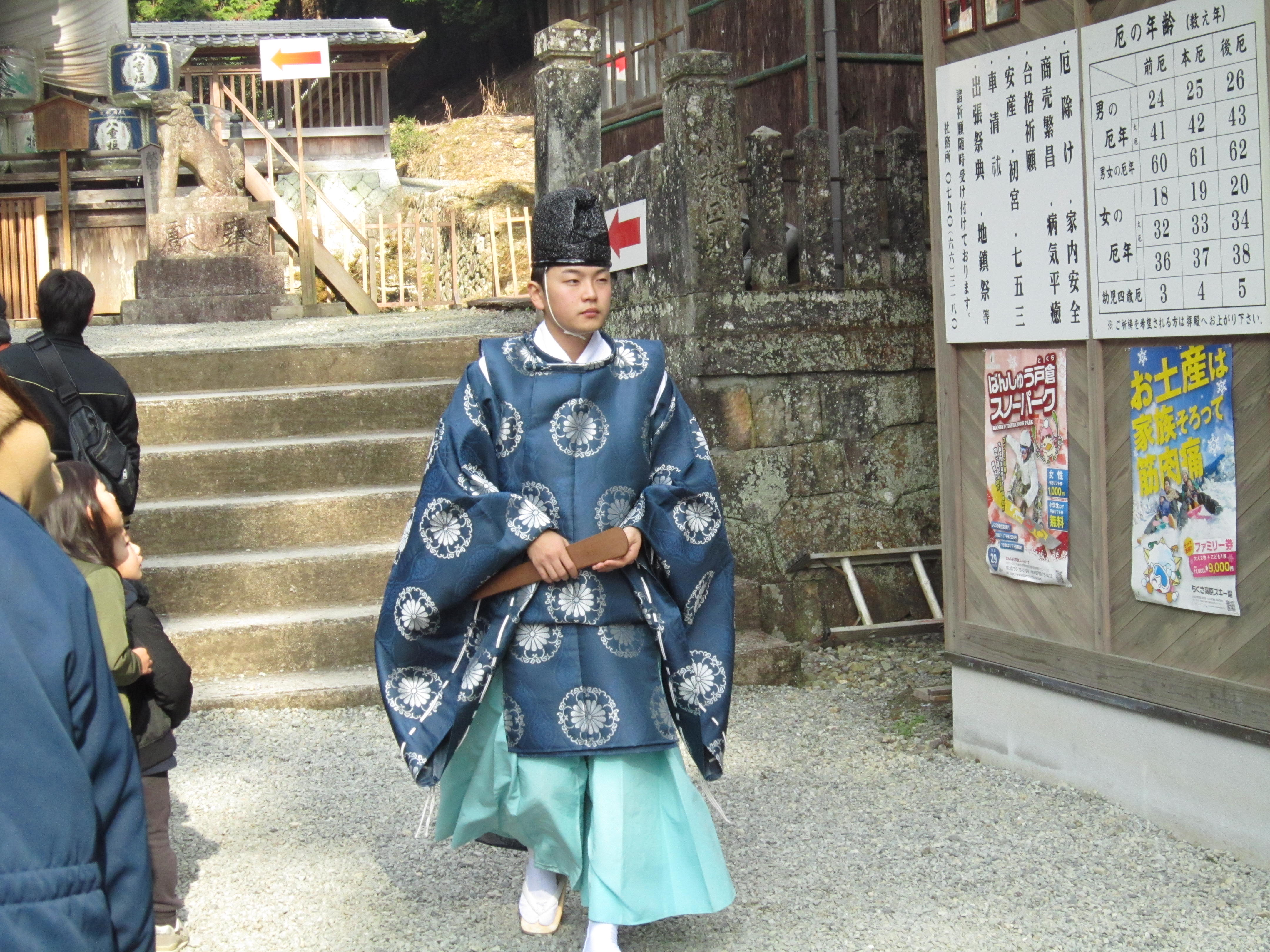 安志稲荷神社・加茂神社。日本国兵庫県姫路市安富町にある神社である。2017年に撮影。境内内を歩く神主。